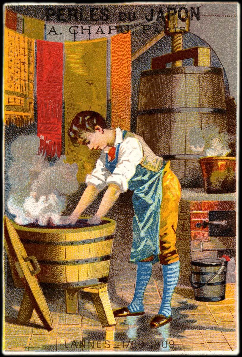 Publicité pour de la lessive : "Les Perles du Japon"